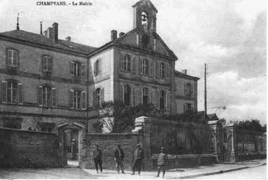 La mairie-école du village de champvans (Jura).